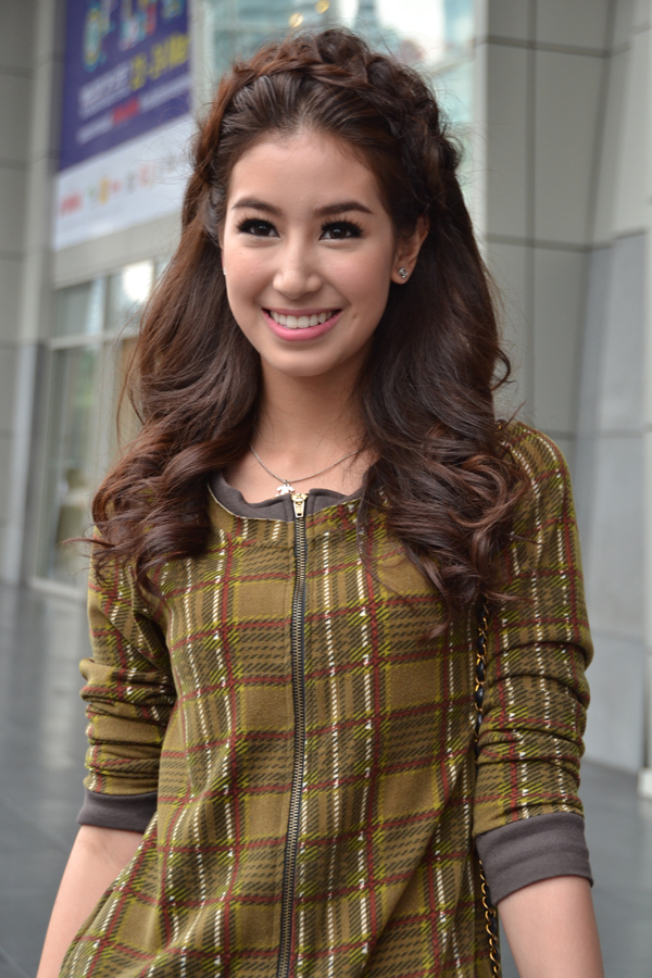 ชาลิดา วิจิตรวงศ์ทอง